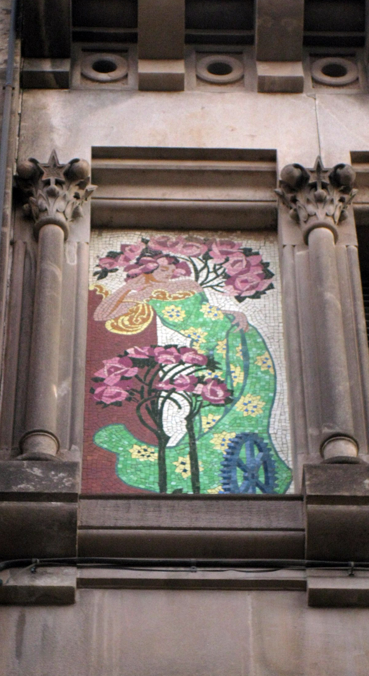 Casa Soteras, antic Banc de Terrassa, al carrer de Sant Jaume núm. 26 (Terrassa). Edifici modernista de Salvador Soteras del 1909. Mosaic de trencadís amb una al·legoria de la indústria.